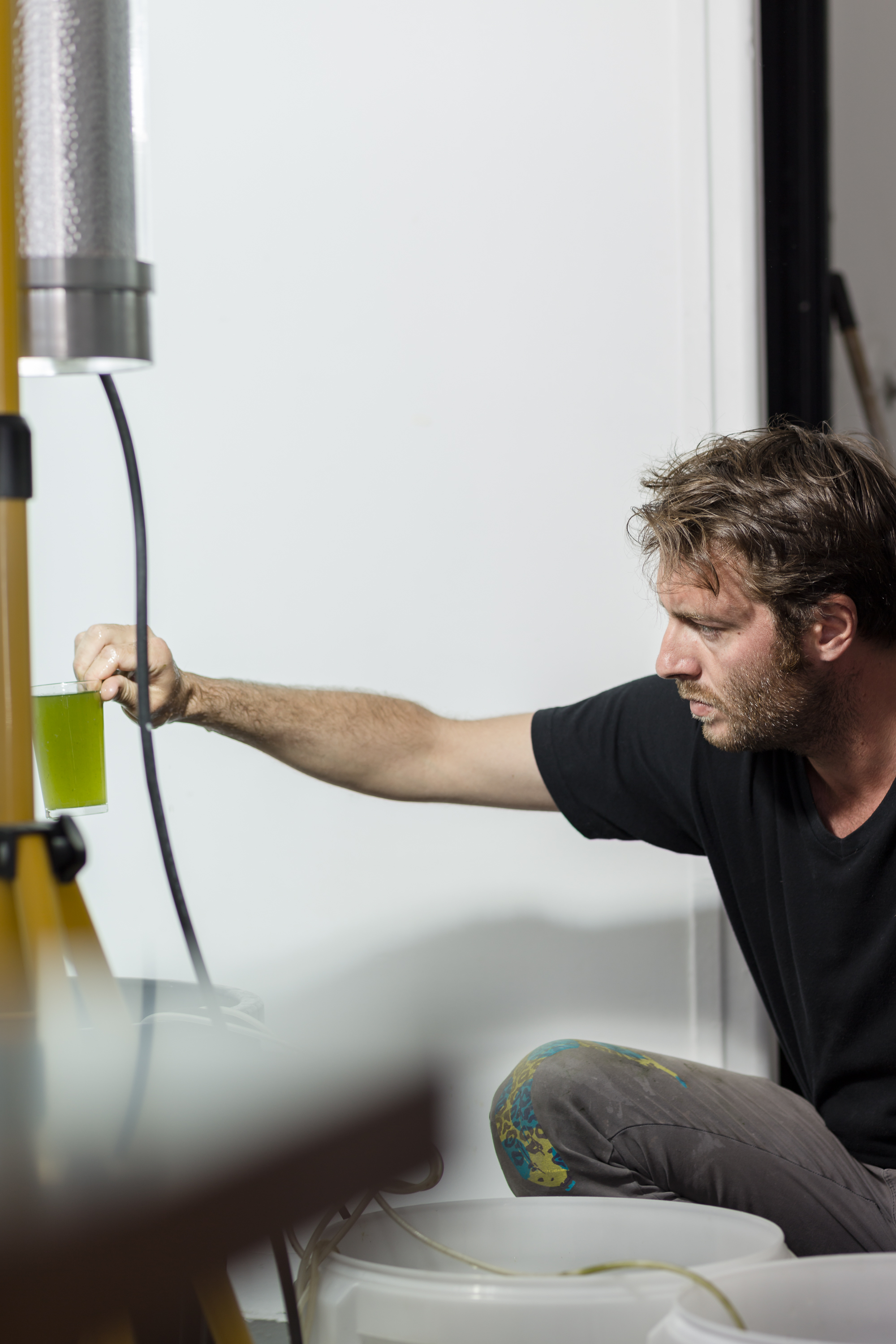 Portrait de Fabien Leaustic pour la revue LeChassis. Photo : Salim Santa Lucia